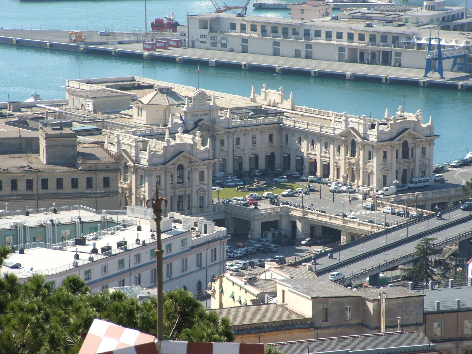 Panorama di Genova dal Castello d'Albertis